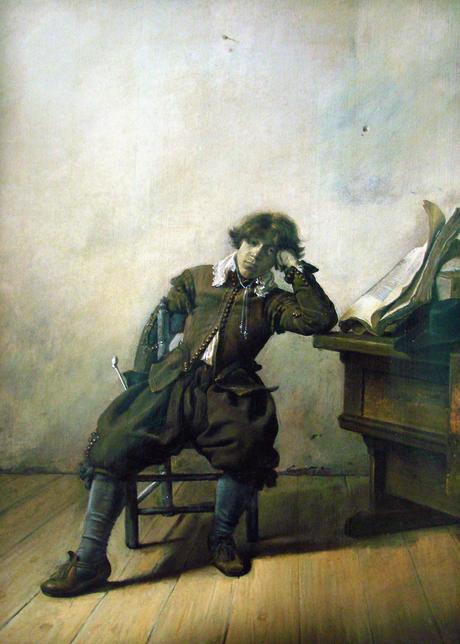 La mélancolie or jeune fumeur de pipe délaissant l'étude